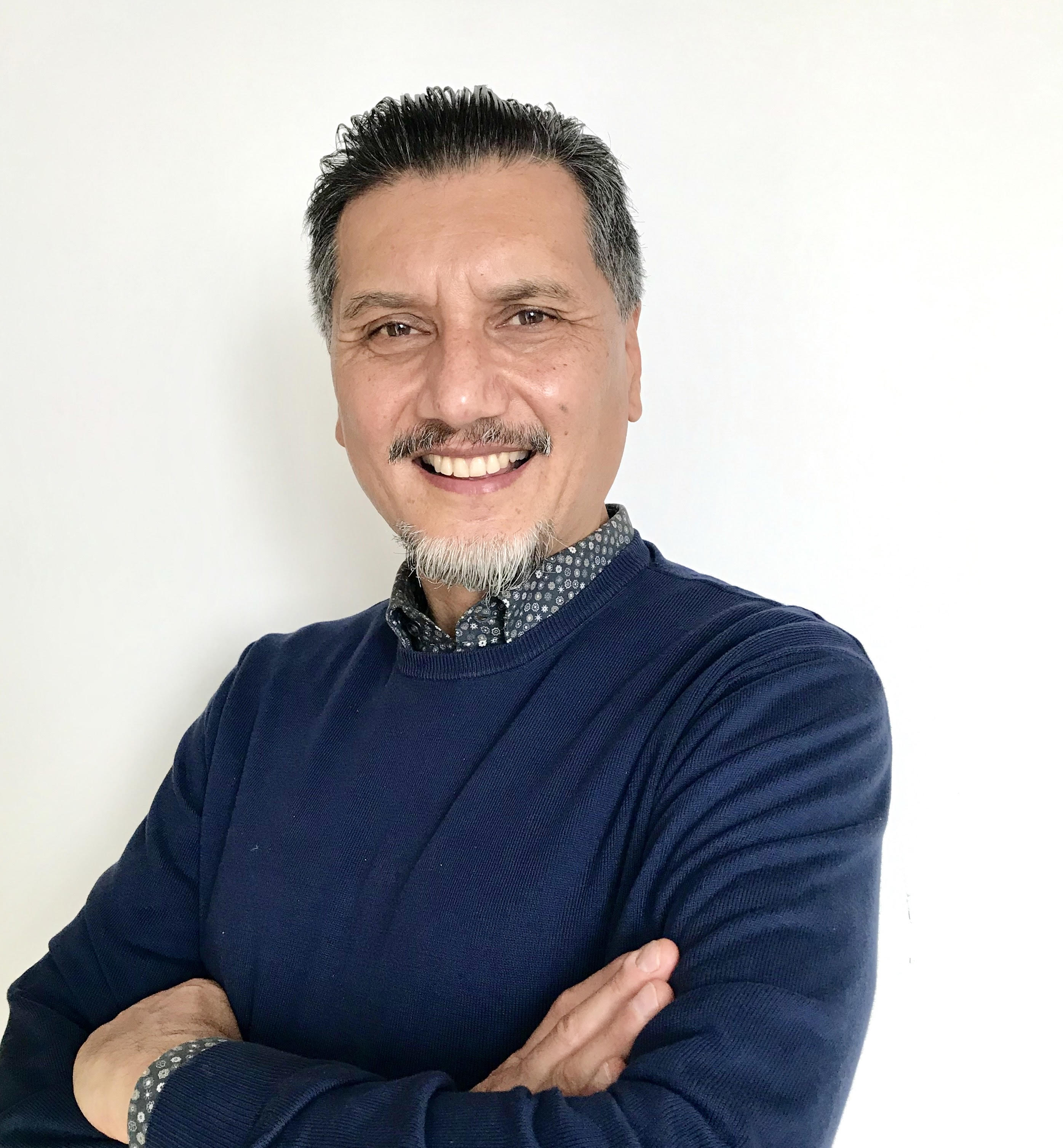 Piero Morosini